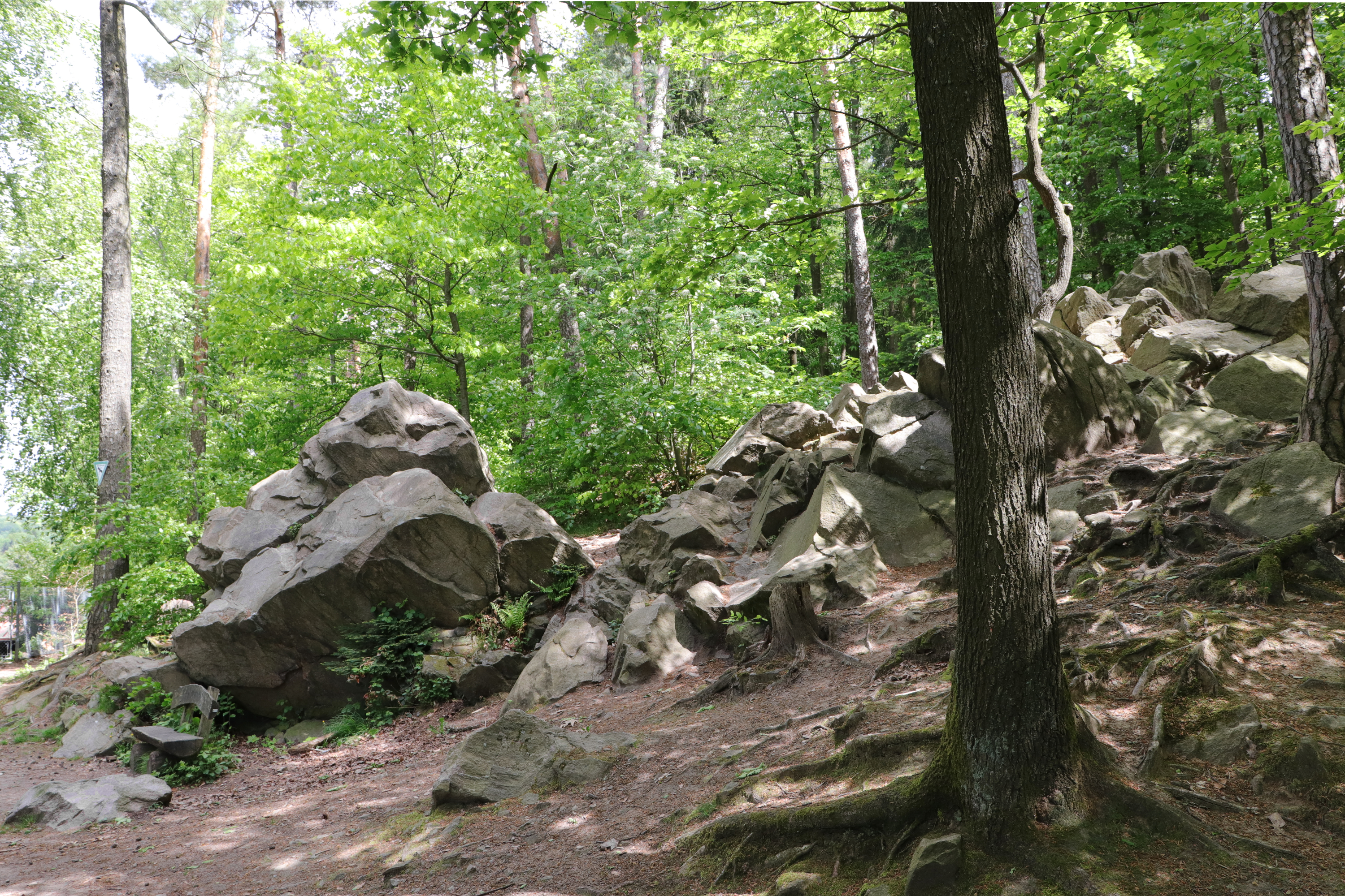 Haibach, Felsgruppe aus Biotit-Gneis am Wildpark, Naturdenkmal und Geotop 67A010